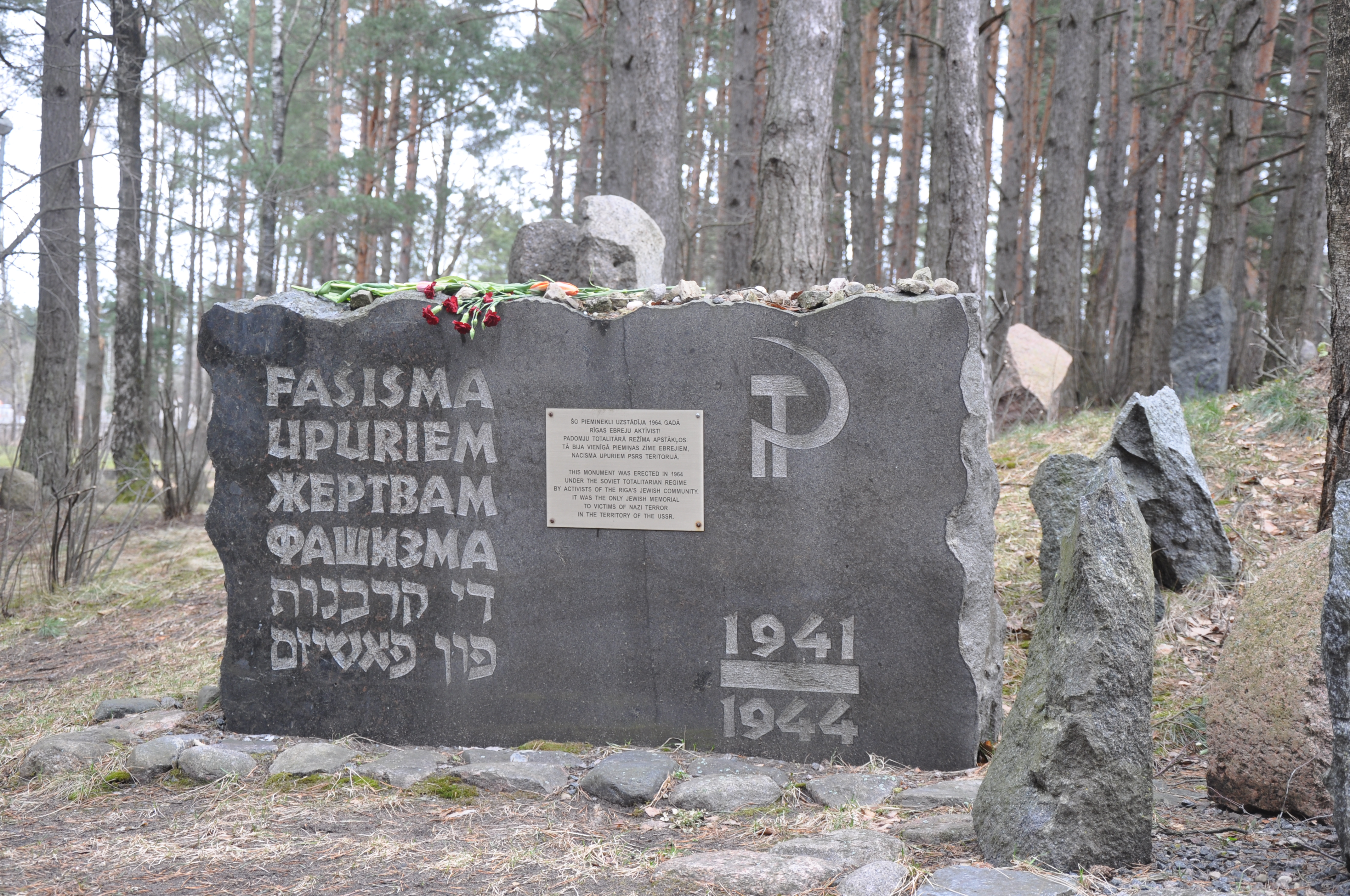 Ebreju masu kapa vieta Rumbulas mežā (vairāk kā 26000 cilvēku) WW2, Rumbula, Rīga, Latvia